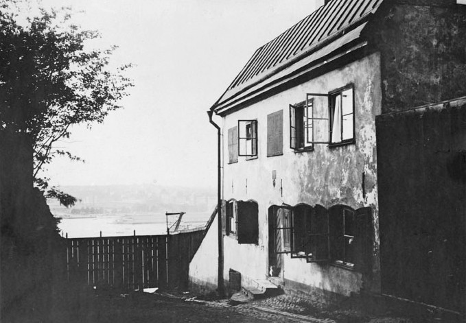 Blektornsgränd nr 1, vy mot norr